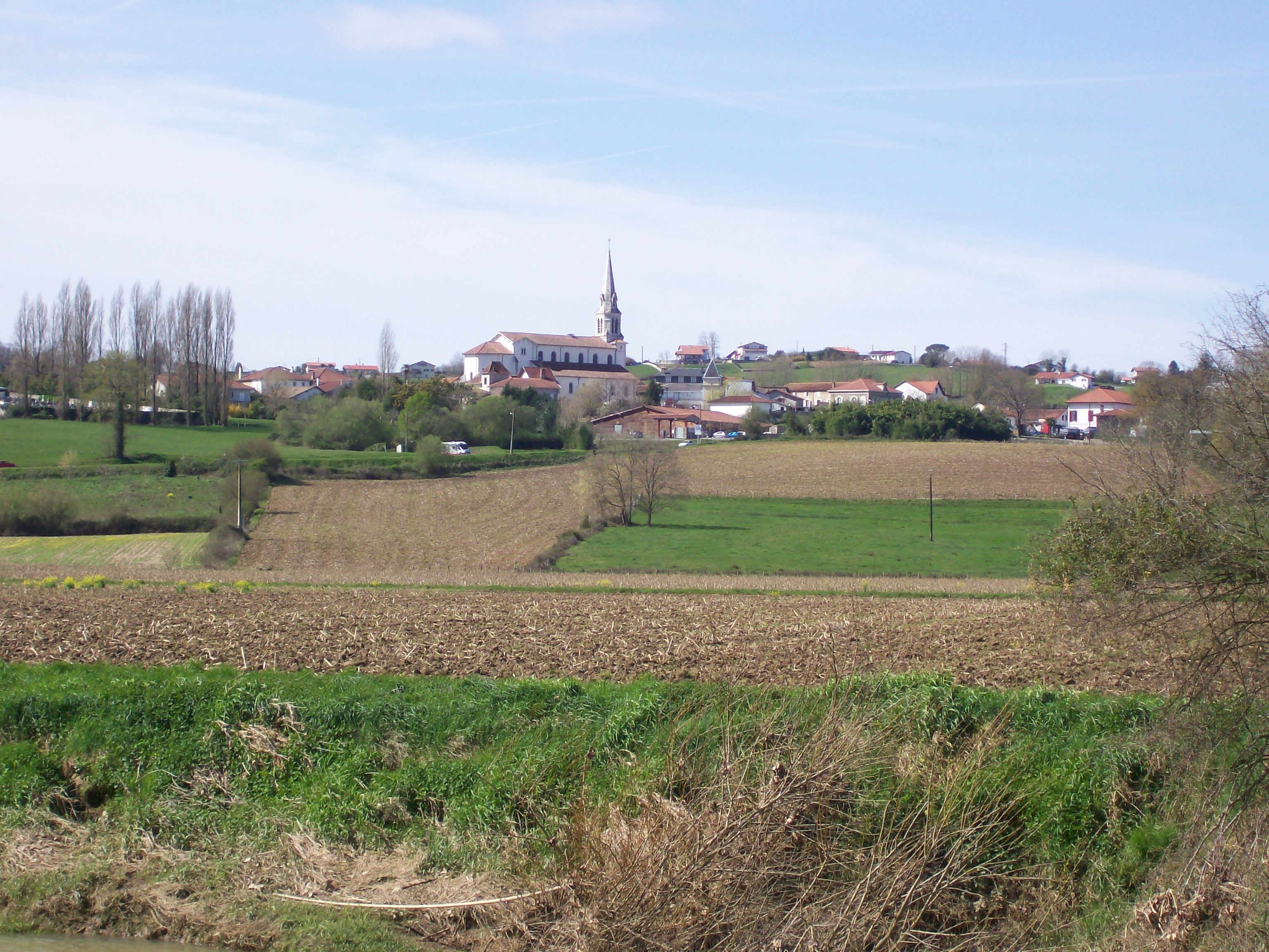 Bidaxuneko ikuspegi orokorra